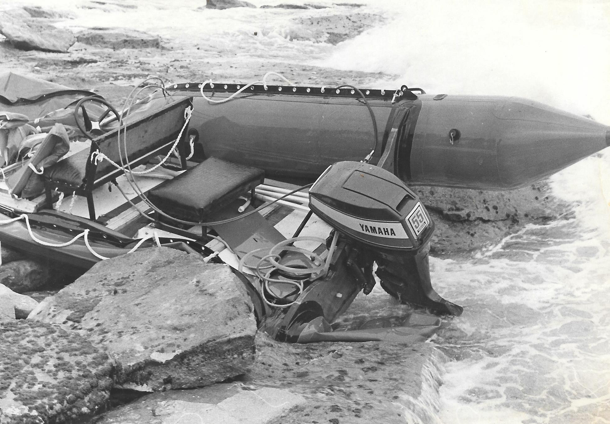 סירת הגומי איתה חדרו המחבלים לחוף נהריה 1979